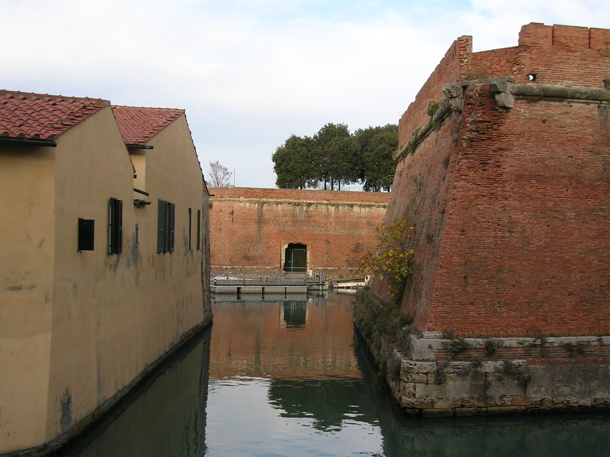 Livorno: la Fortezza Nuova, iniziata nel 1590.